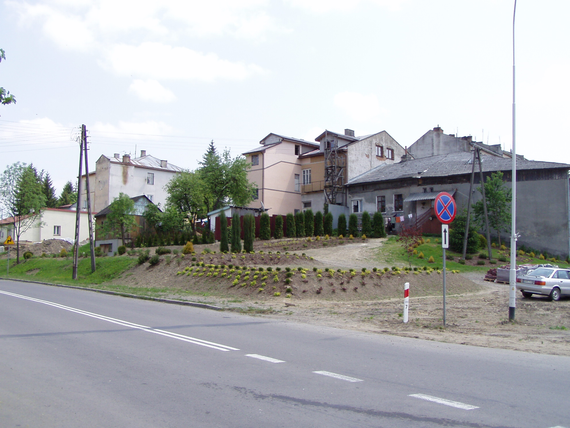 miejsce po zburzonej synagodze w Birczy